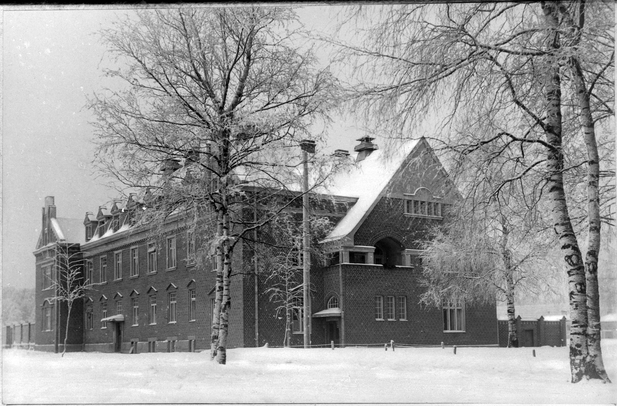 Valokuvassa on Lambert Pettersonin suunnittelema Tampereen synnytyslaitos, joka valmistui Mariankadun varrelle vuonna 1913. Rakennus muutettiin 1960-luvulla vanhusten sairaalaksi (Marjatan sairaala).